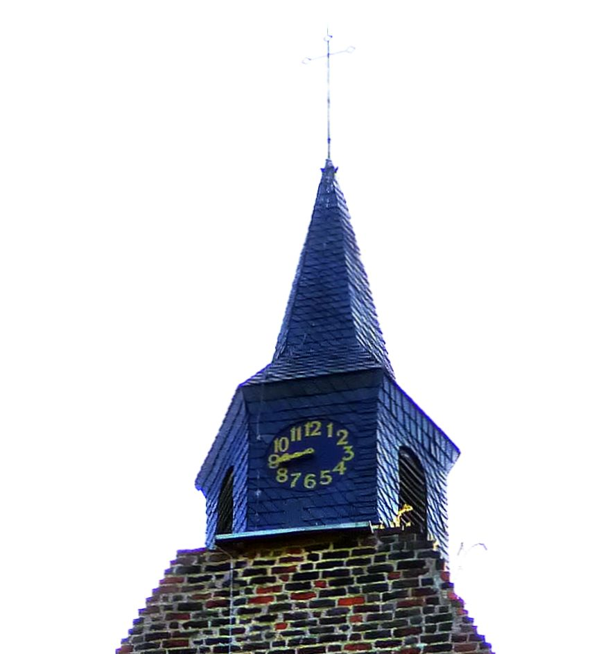 Kirchturm der Dorfkirche Burxdorf